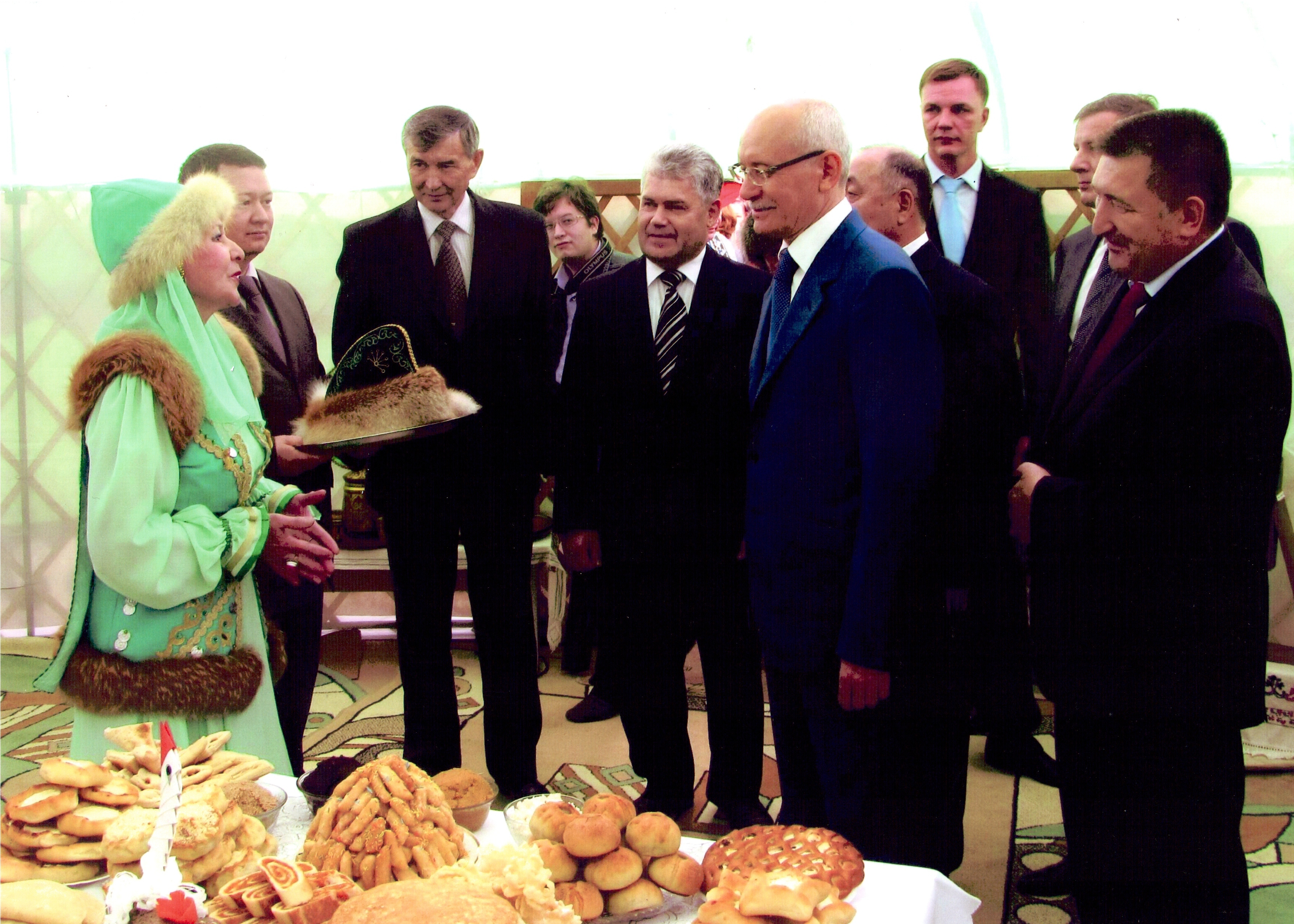 Нефтекама дәүләт филармонияһы. Республика башлығы Р.Хәмитов